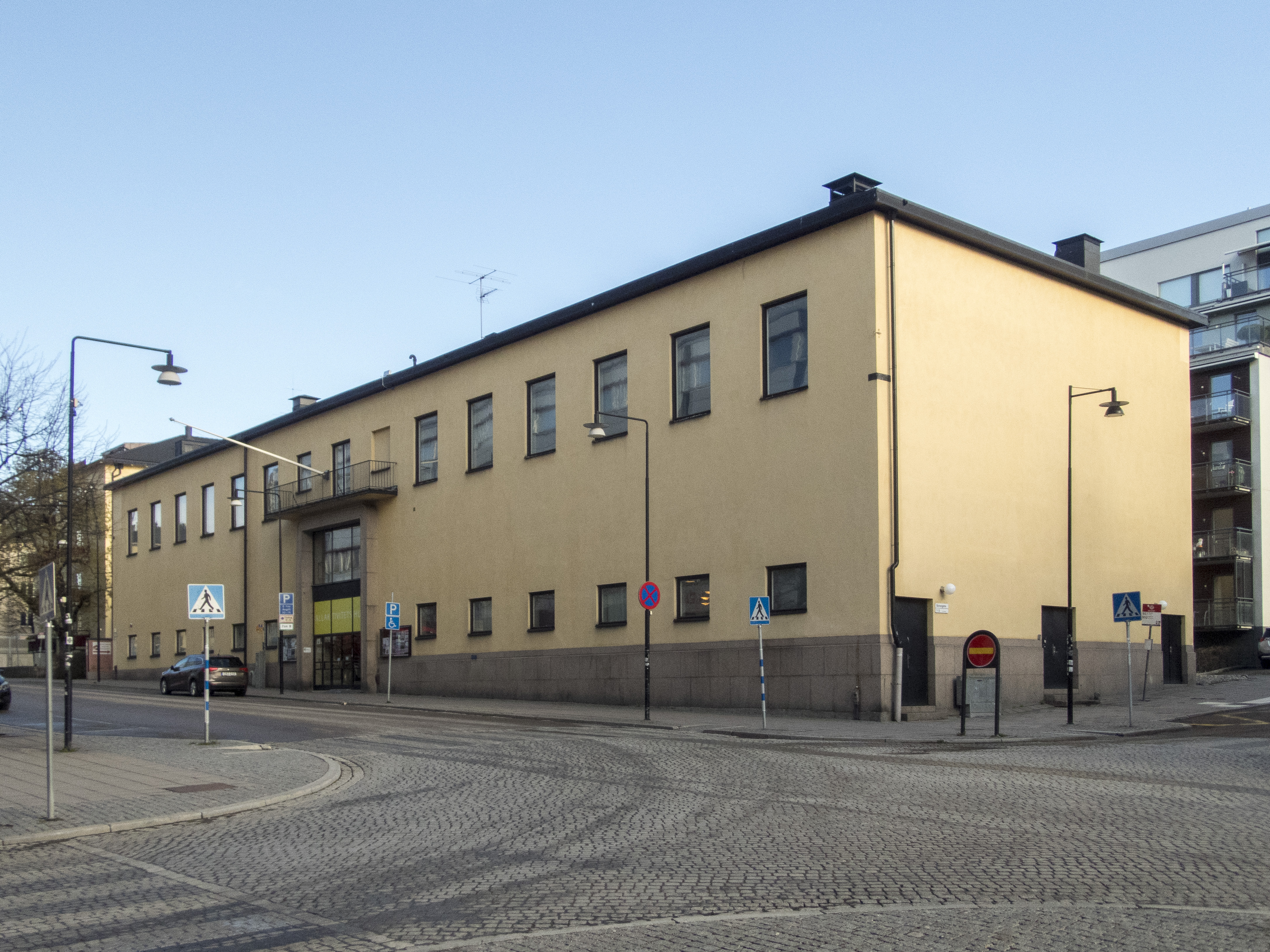 Sundbybergs Allaktivitetshus. Uppfört 1930 som Nya Folkets hus. Arkitekter Eskil Sundahl och Artur von Schmalensee